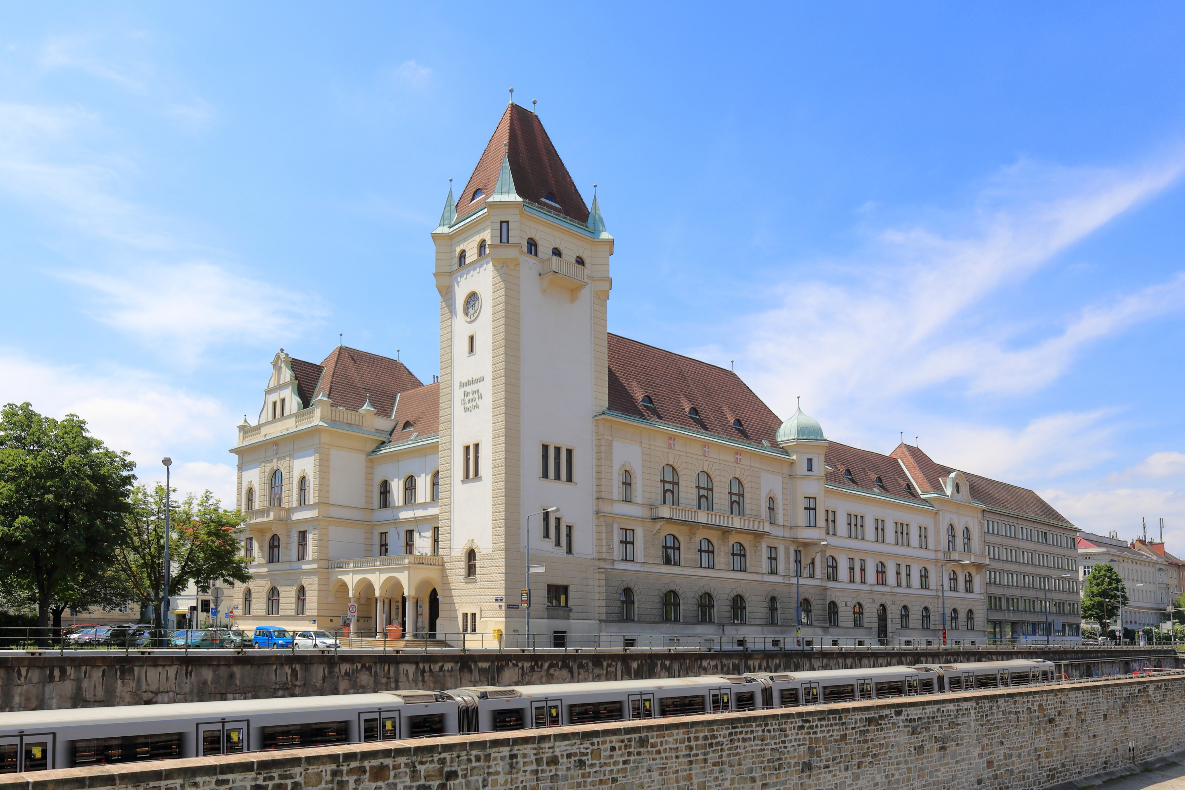 Nordostansicht des Bezirksamtes für den 13. und 14. Bezirk am Hietzinger Kai im 13. Wiener Gemeindebezirk Hietzing.Das Amtshaus entstand auf dem Gelände des ehemaligen Betriebsbahnhofes der Dampftramway und wurde von 1912 bis 1913 nach Plänen des Stadtbauamts errichtet (Einzug der Bezirksvorstehung und der Bezirksverwaltung am 12. Jänner 1914). Die Ausführung erfolgte durch den Baumeister Guido Gröger und die Bildhauerarbeiten stammen von Leopold Geyer. Nach Bombenschäden im Jahr 1945 wurde es Ende der 1940er Jahre und Anfang der 1950er Jahre wiederaufgebaut bzw. wiederinstandgesetzt. Dabei wurde unter anderem der Festsaal im Stil der 1950er-Jahre neu gestaltet.